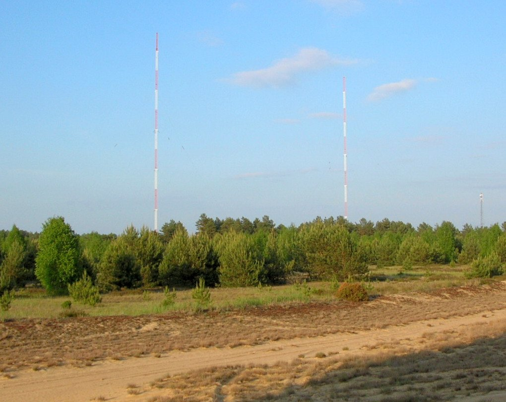 Maszty rozgłośni 1 Programu PR w Puszczy Bydgoskiej